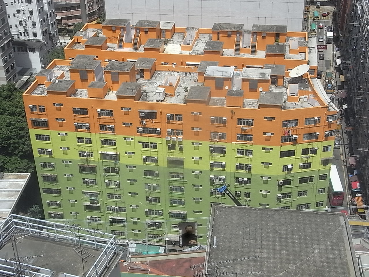 中文（香港）: 香港島zh:西半山區錦明閣外望 - 樓景及zh:石塘咀西環大樓